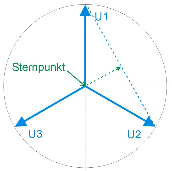 Bei fehlendem Neutralleiter verschiebt sich der Sternpunkt (grün)